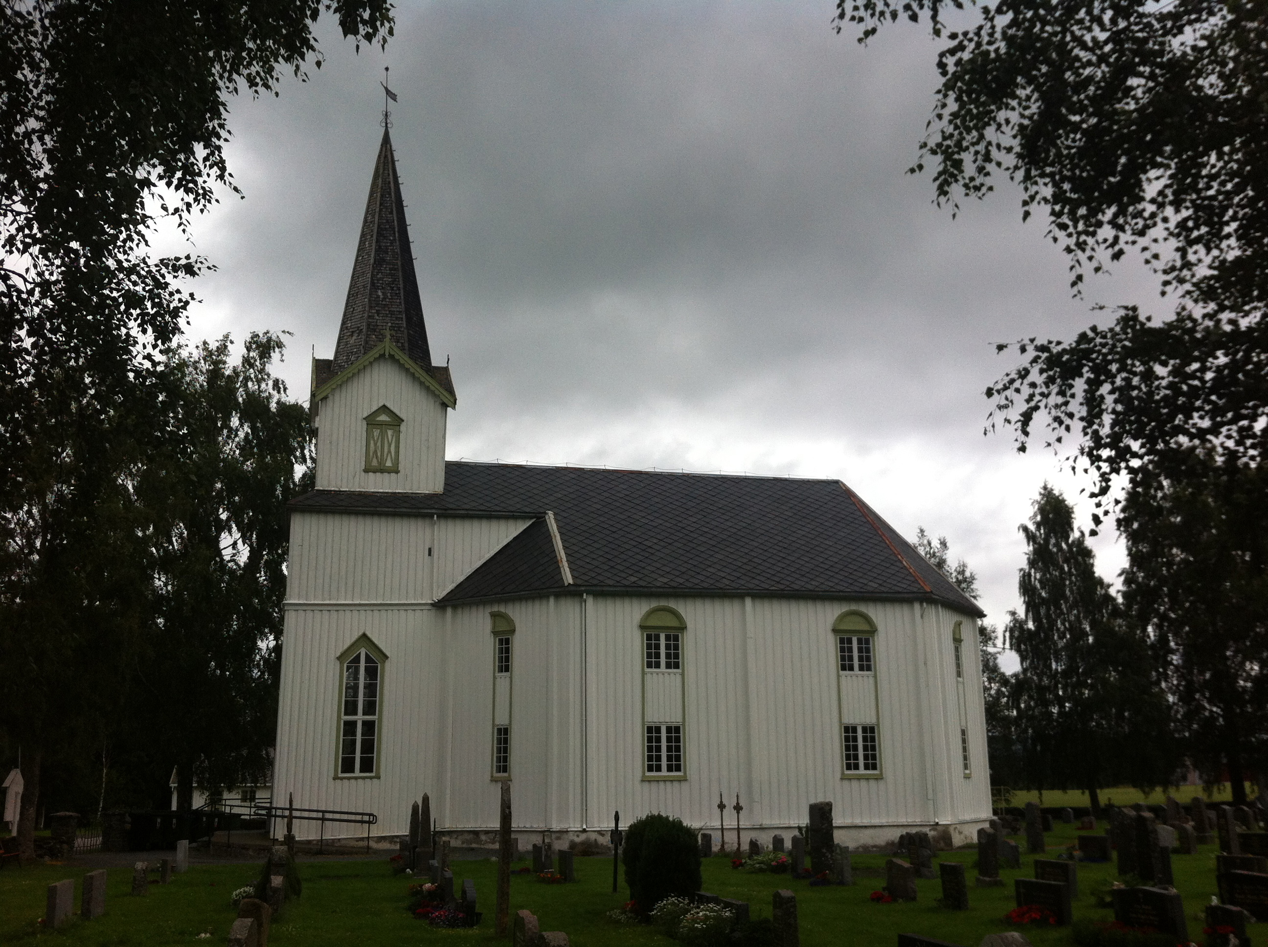 Vinne kirke i Verdal kommune, Nord-Trøndelag. Bygget 1817